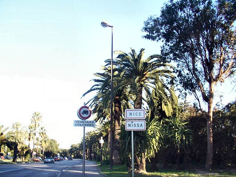 Nice-Promenade Corniglion-Molinier De l'aeroport à la Californie (Direction E)